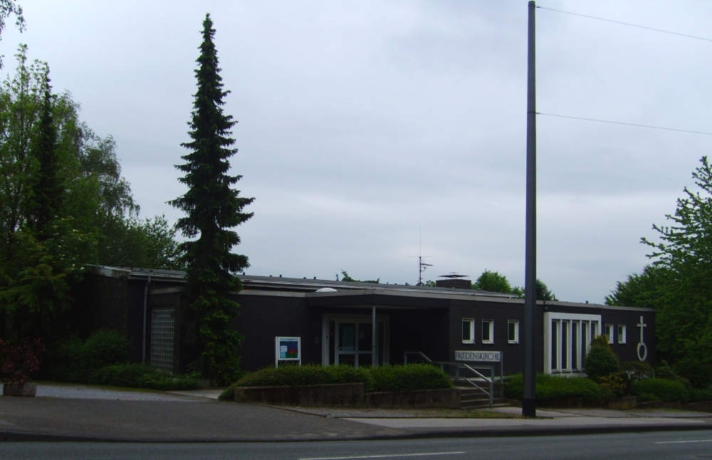 Friedenskirche, Cronenberg, Wuppertal, Germany